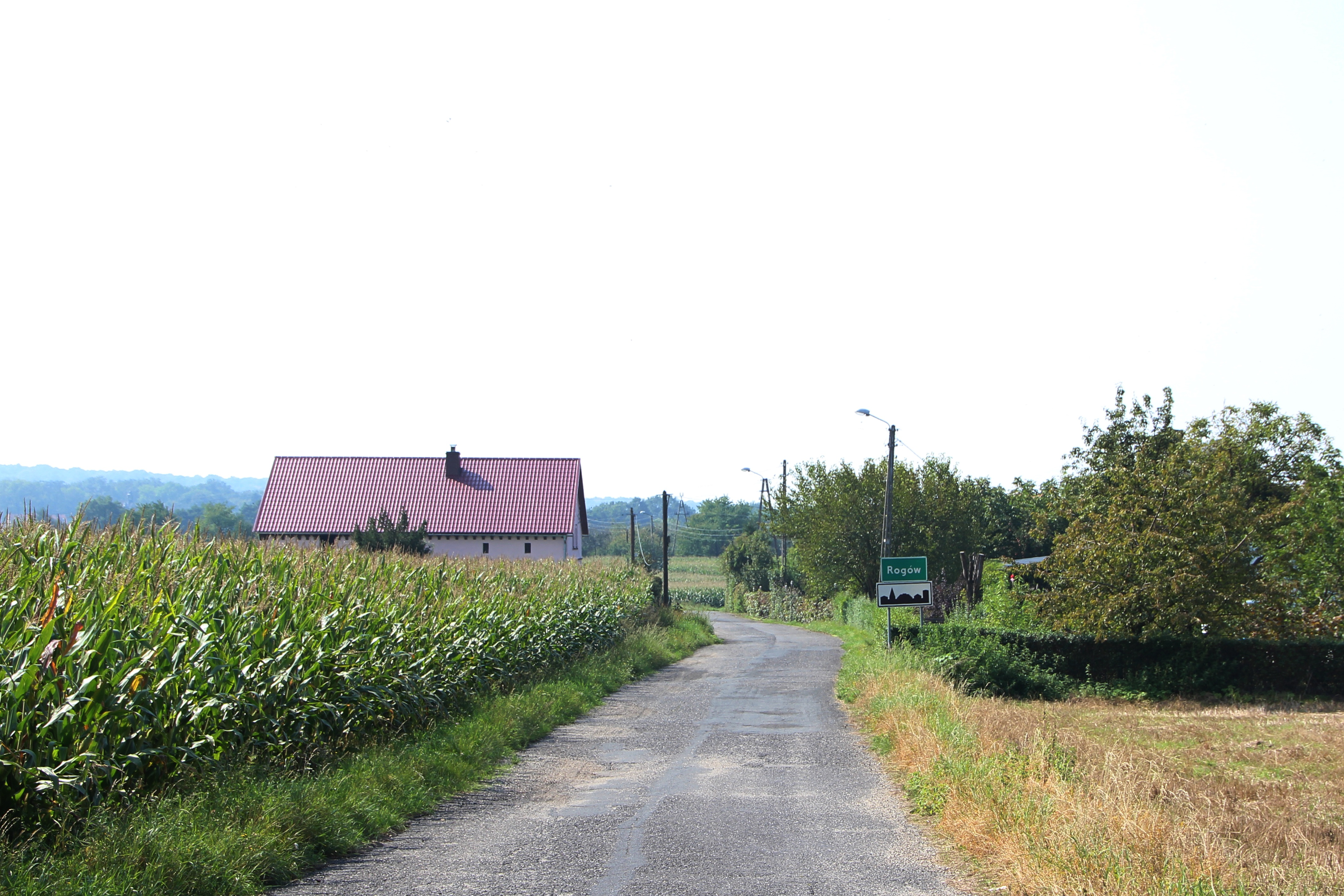 Rogów – wieś w Polsce położona w województwie opolskim, w powiecie brzeskim, w gminie Grodków.